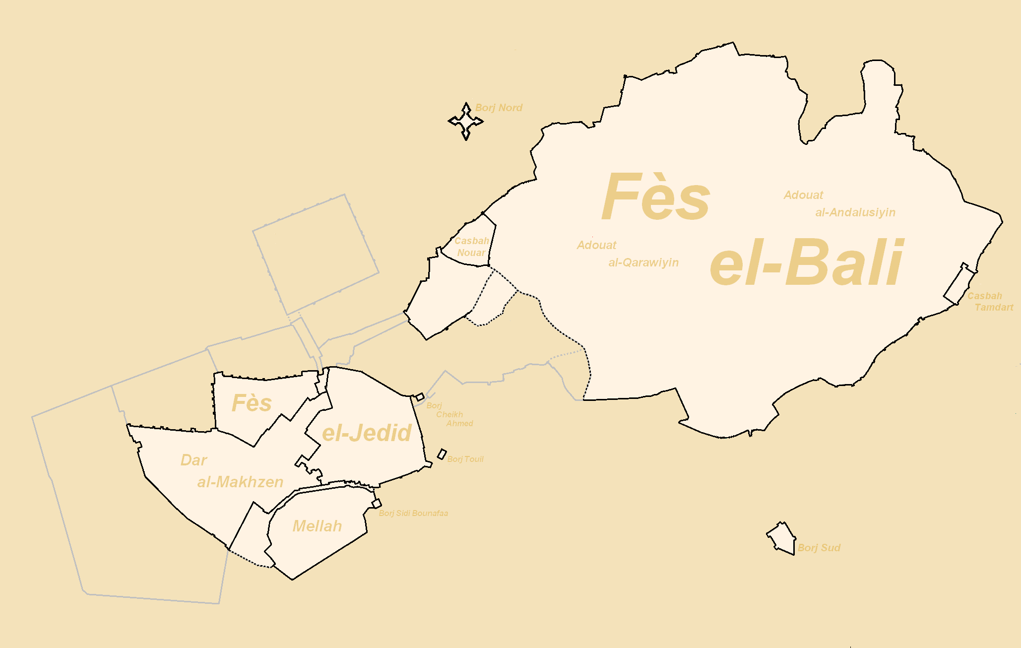 Carte des fortifications de Fès entre la fin de l'ère saadienne et au début de l'ère alaouite. Version modifiée de File:Carte Fortifications de Fes - Saadiens.PNG